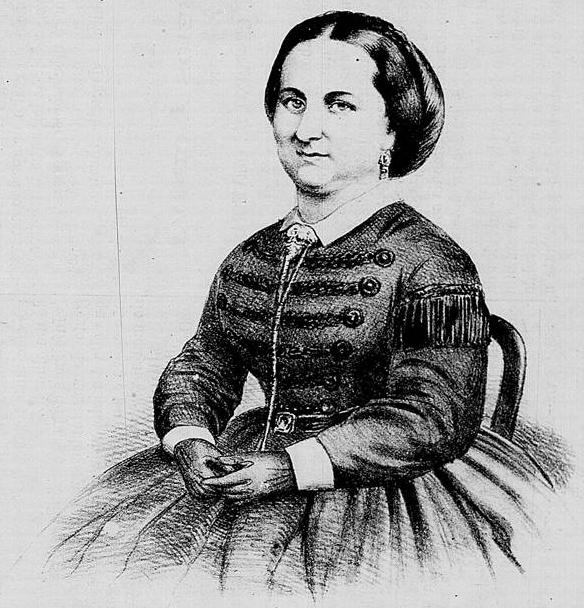 Elisa Augusta Linch